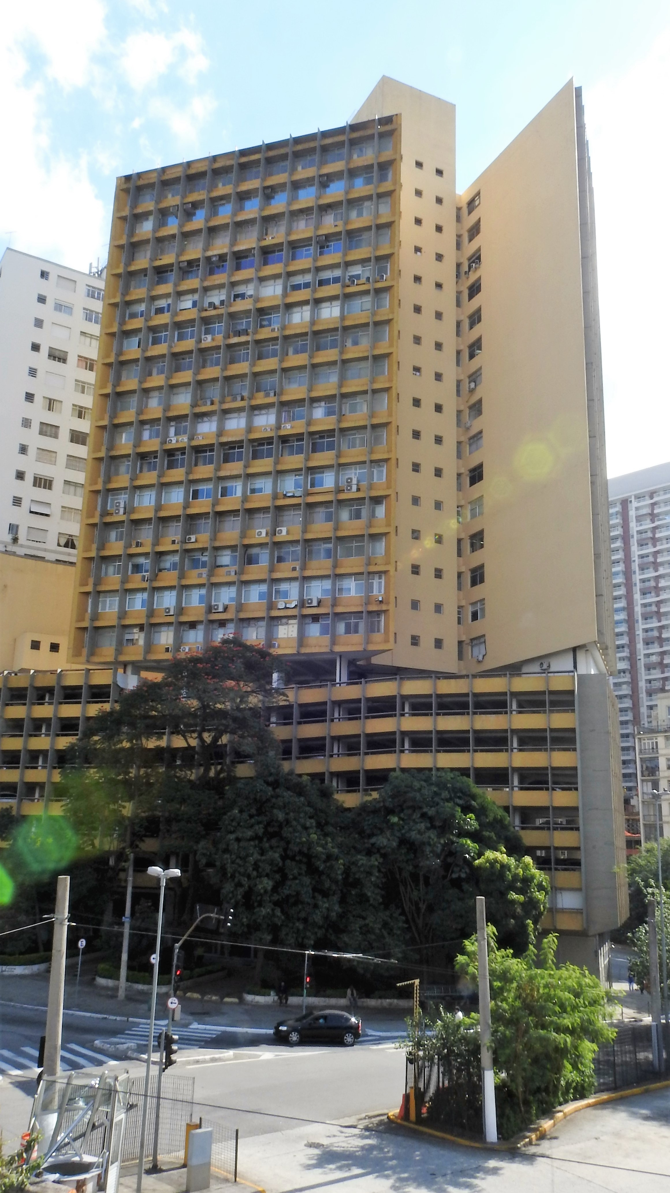 Bela Vista, São Paulo - State of São Paulo, Brazil